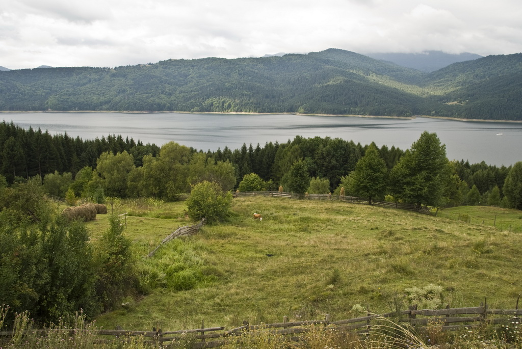 Lacul Bicaz